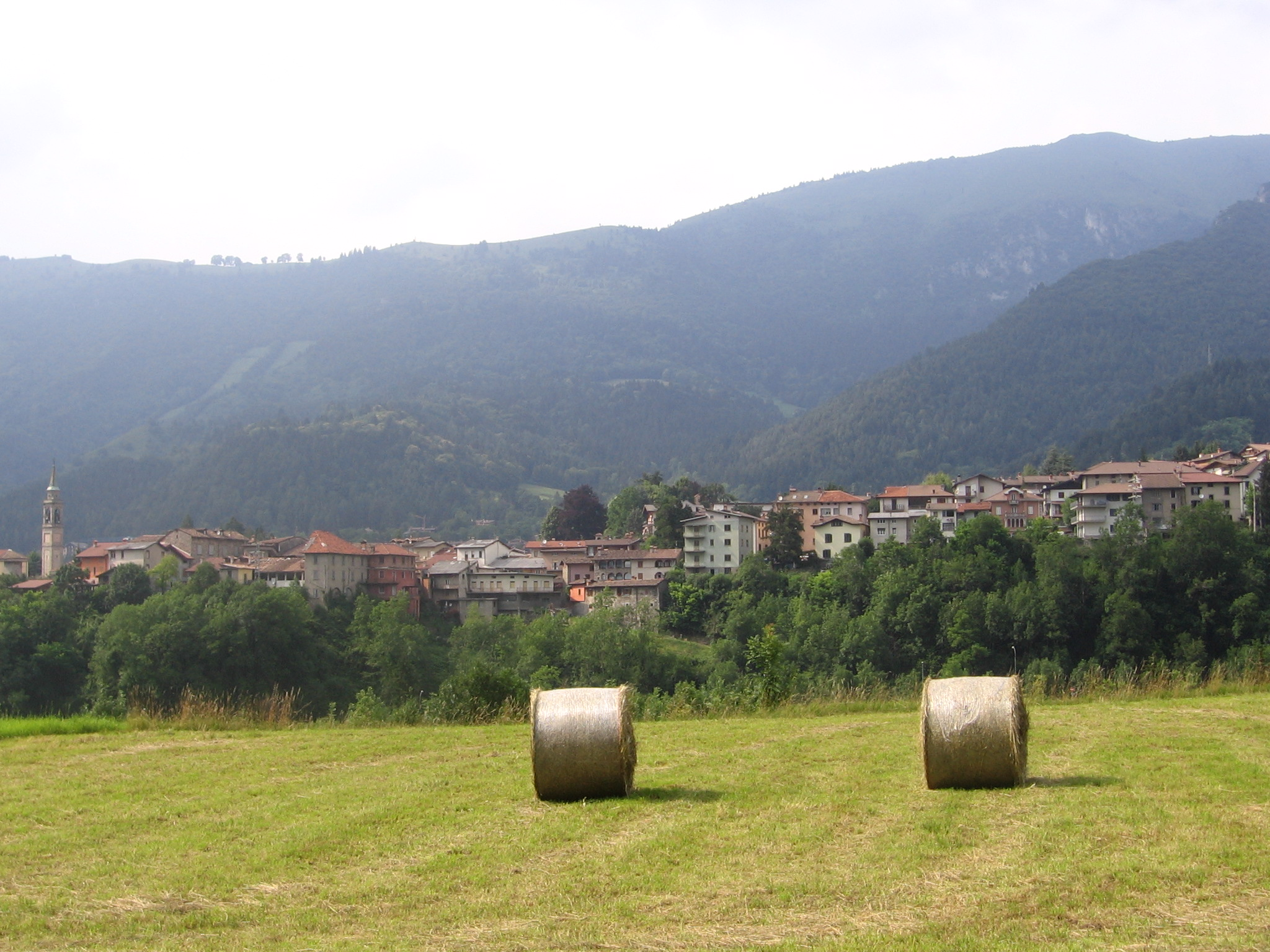 Fino del monte, Bergamo, Italy